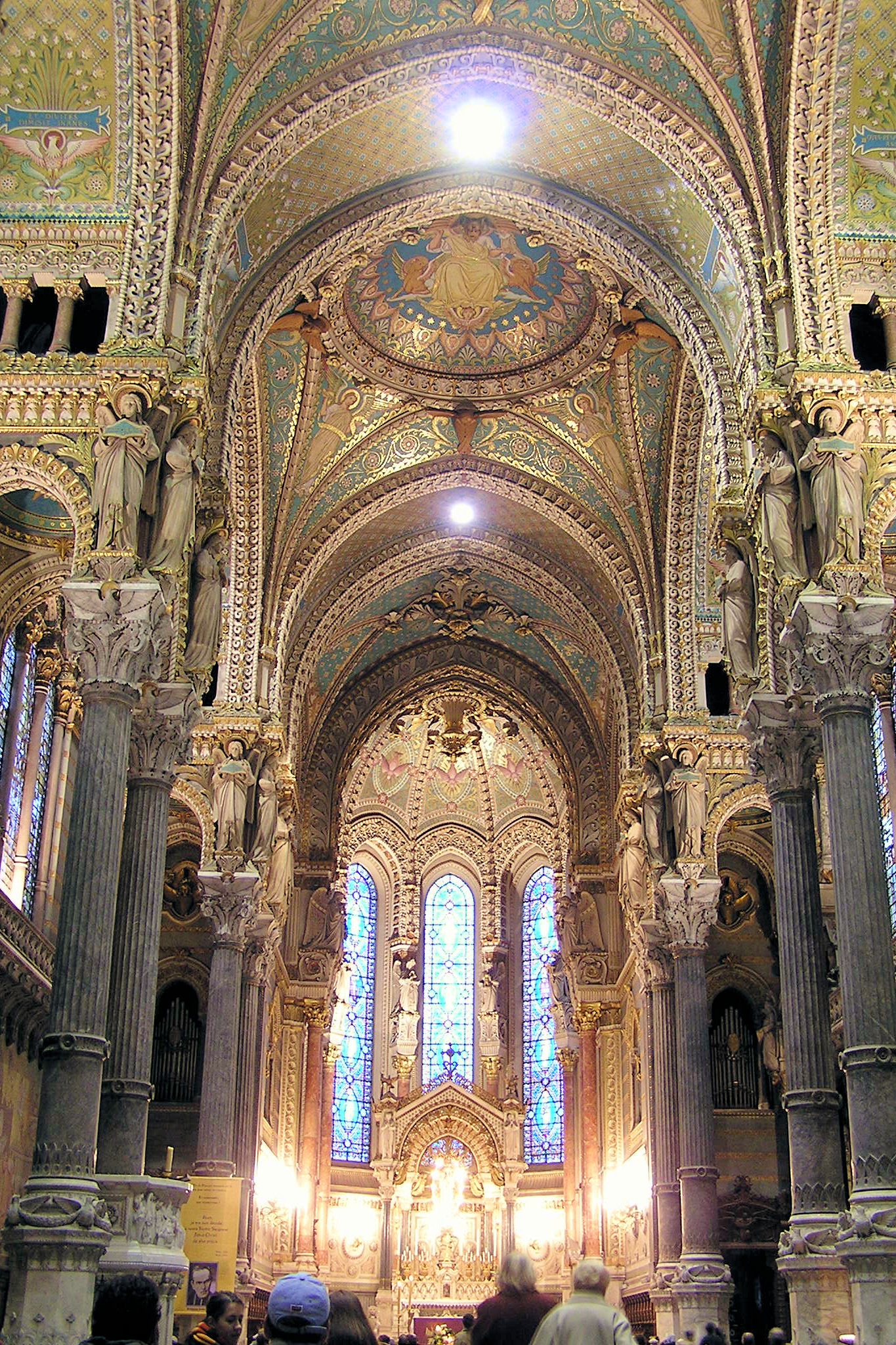 Basilique Notre-Dame de Fourvière